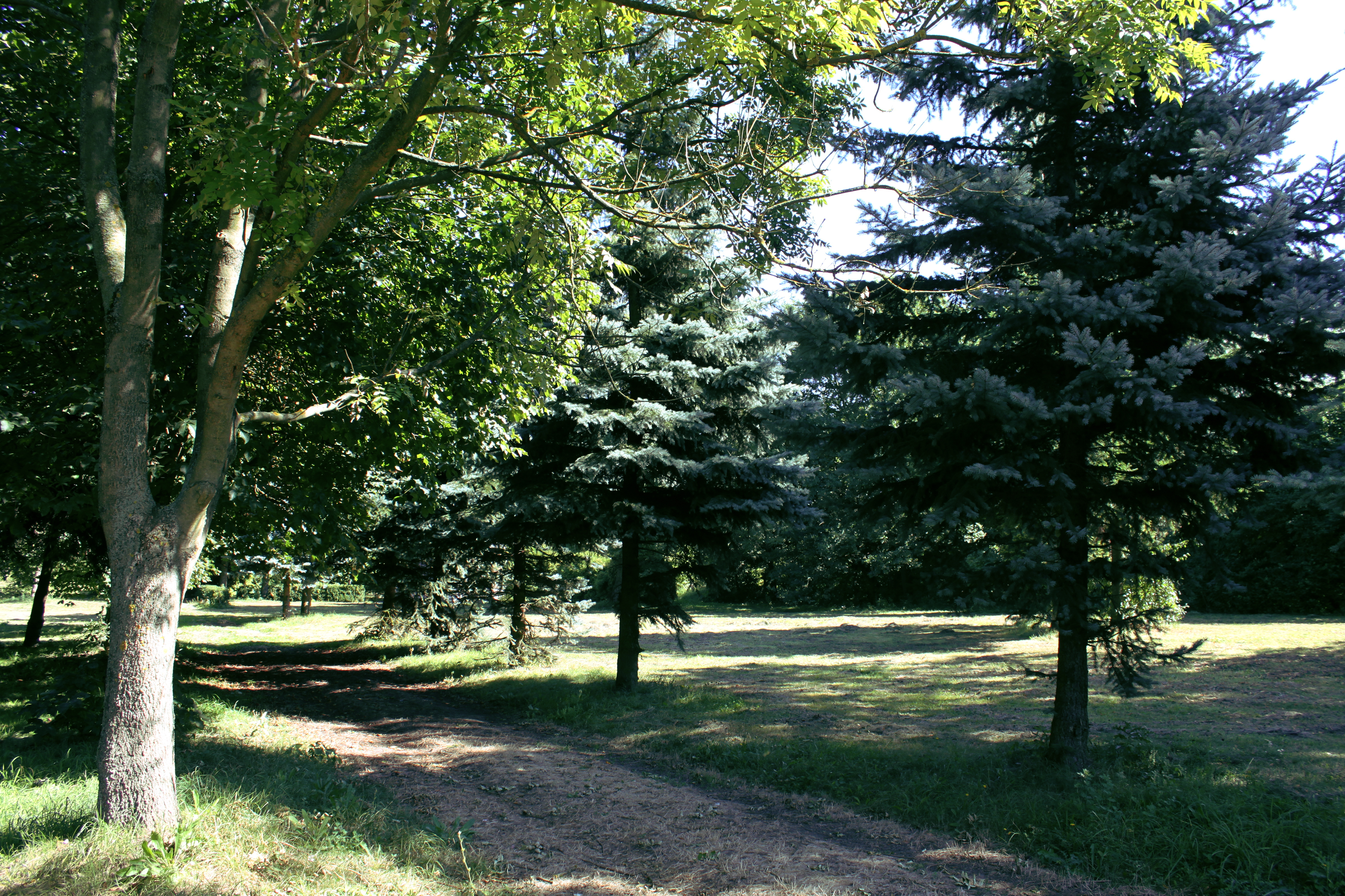 Seroczki, park, XVIII, 2 poł. XIX, 1926-1927